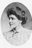 Eluned Morgan (Bay of Biscay, March 20, 1870 - Gaiman, Argentina, December 29, 1938), Welsh Argentine writer born at sea, daughter of Lewis Jones (1836-1904), one of the leaders of the Welsh diaspora in Chubut, Patagonia (Y Wladfa).